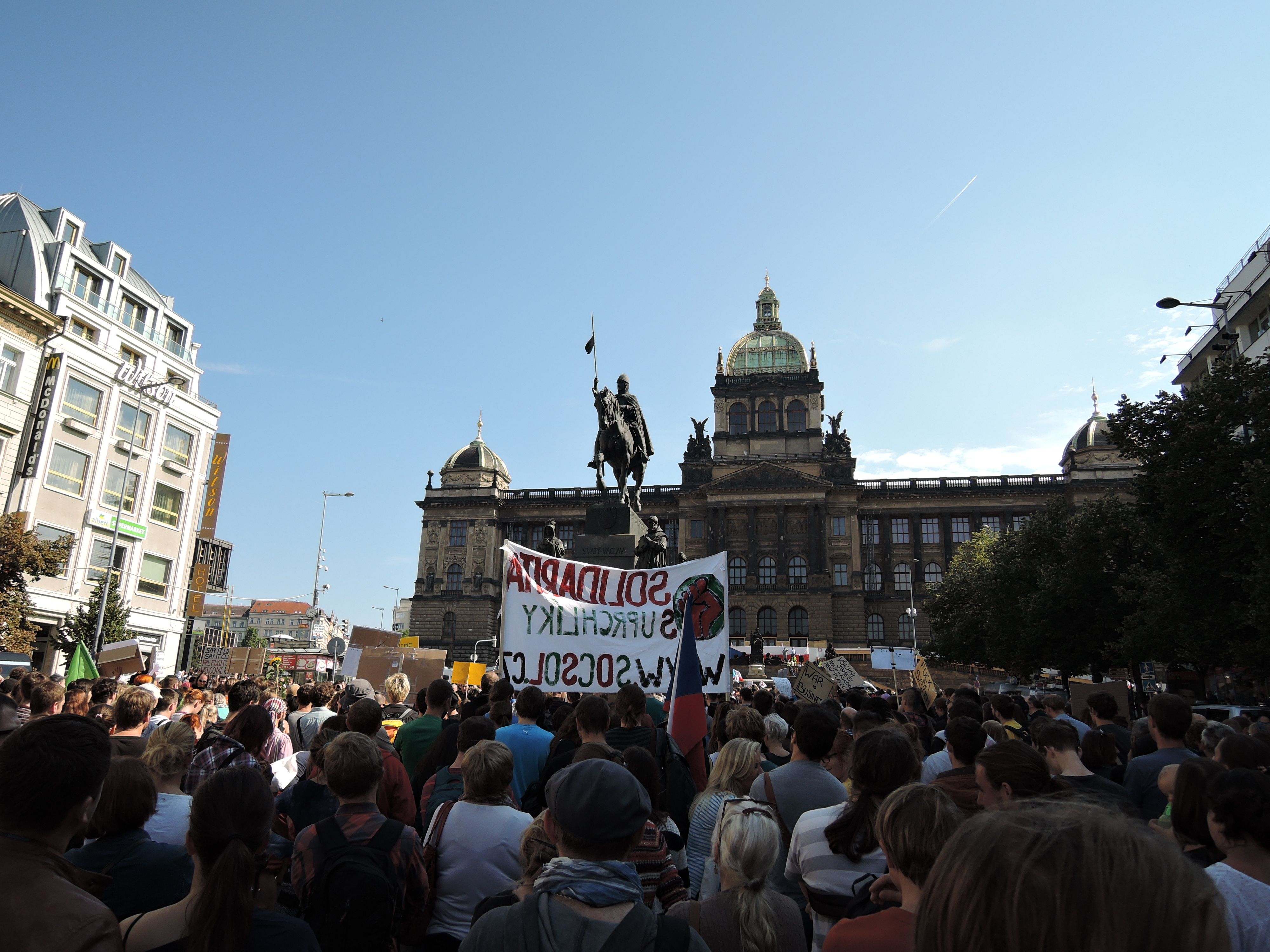 Praha, Václavské náměstí, demonstrace Za otevřenou Evropu, proti rasismu a xenofobii